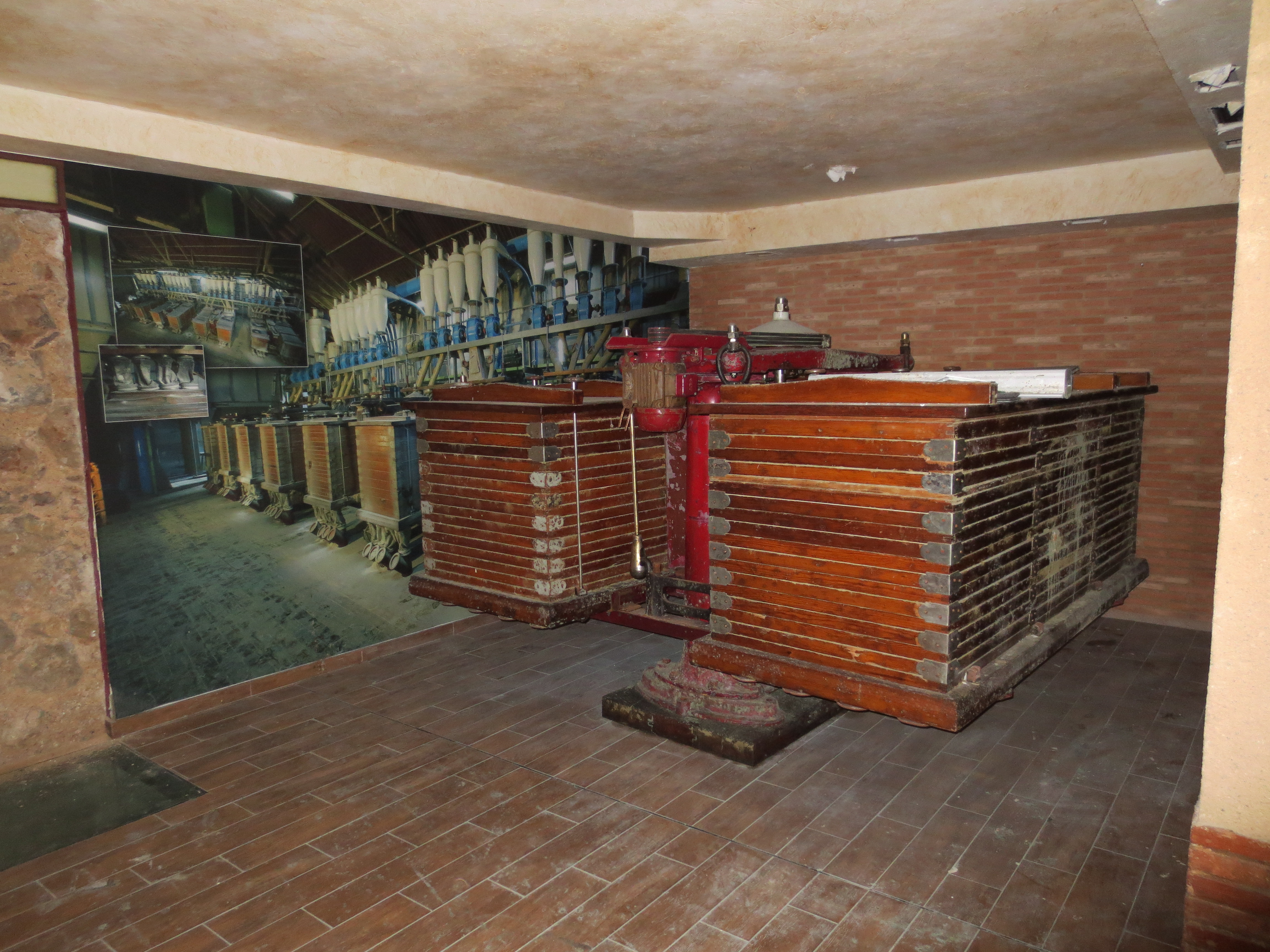 La fábrica de harinas «La Perla» fue una antigua harinera construida entre 1856 y 1857 en el tercer salto de agua de la dársena del Canal de Castilla en Valladolid (España). Se trata de una instalación fabril, destinada a la producción de harinas, que aprovechaba el agua del canal para alimentar la maquinaria interior hoy desaparecida. Desde 2008 albergó el Hotel Marqués de la Ensenada hasta su cierre, en 2016. Dos años después se inauguró el proyecto Centro Social La Molinera para la reutilización autogestionada del inmueble. Vestigios industriales. Paneles de la musealización.